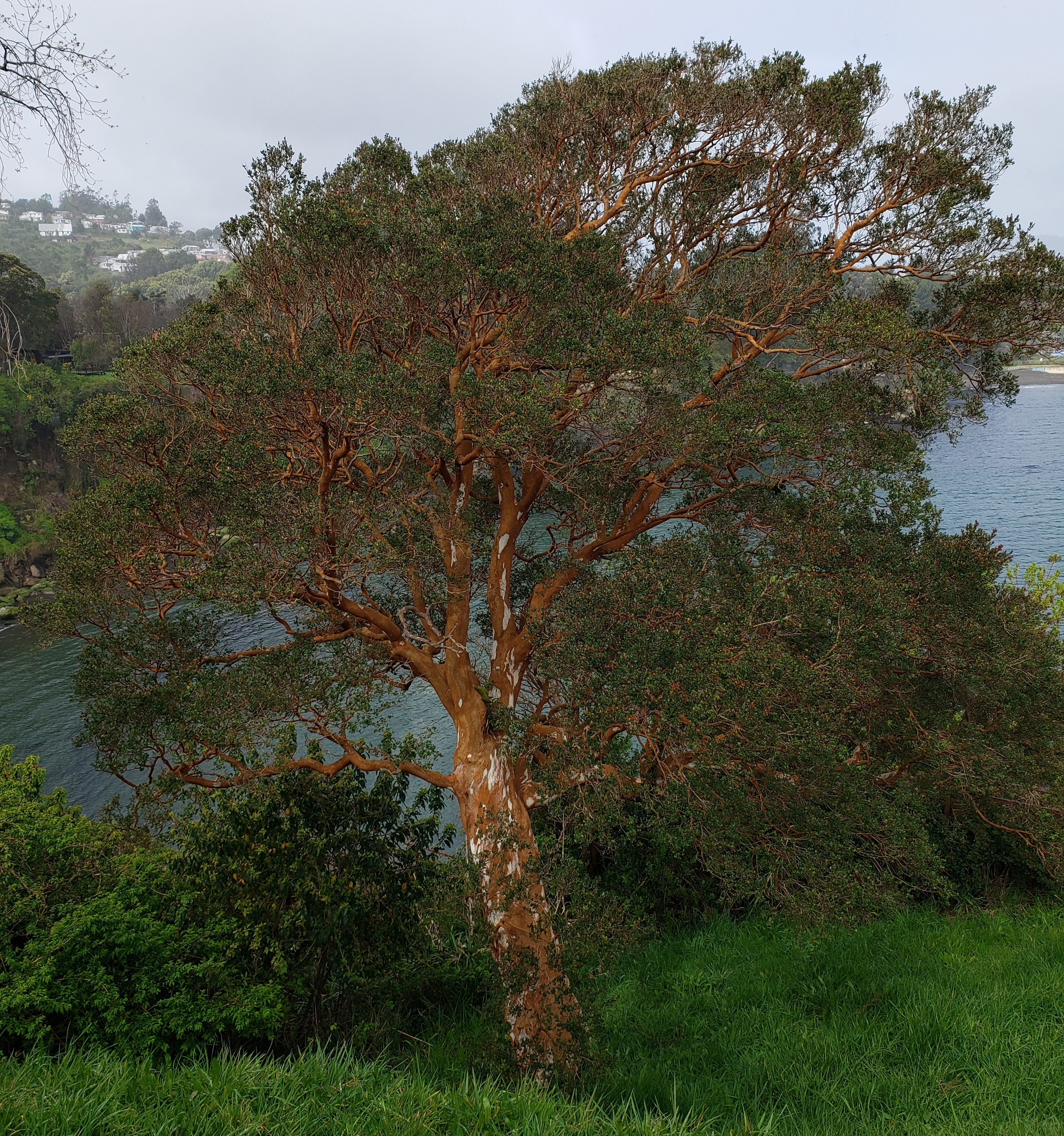 Luma apiculata (Arrayán rojo) en la localidad de Niebla, Chile.